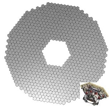 E-ELT-M1-mirror 4-m Convex Aspheric f/1.1 Passive + Position Control